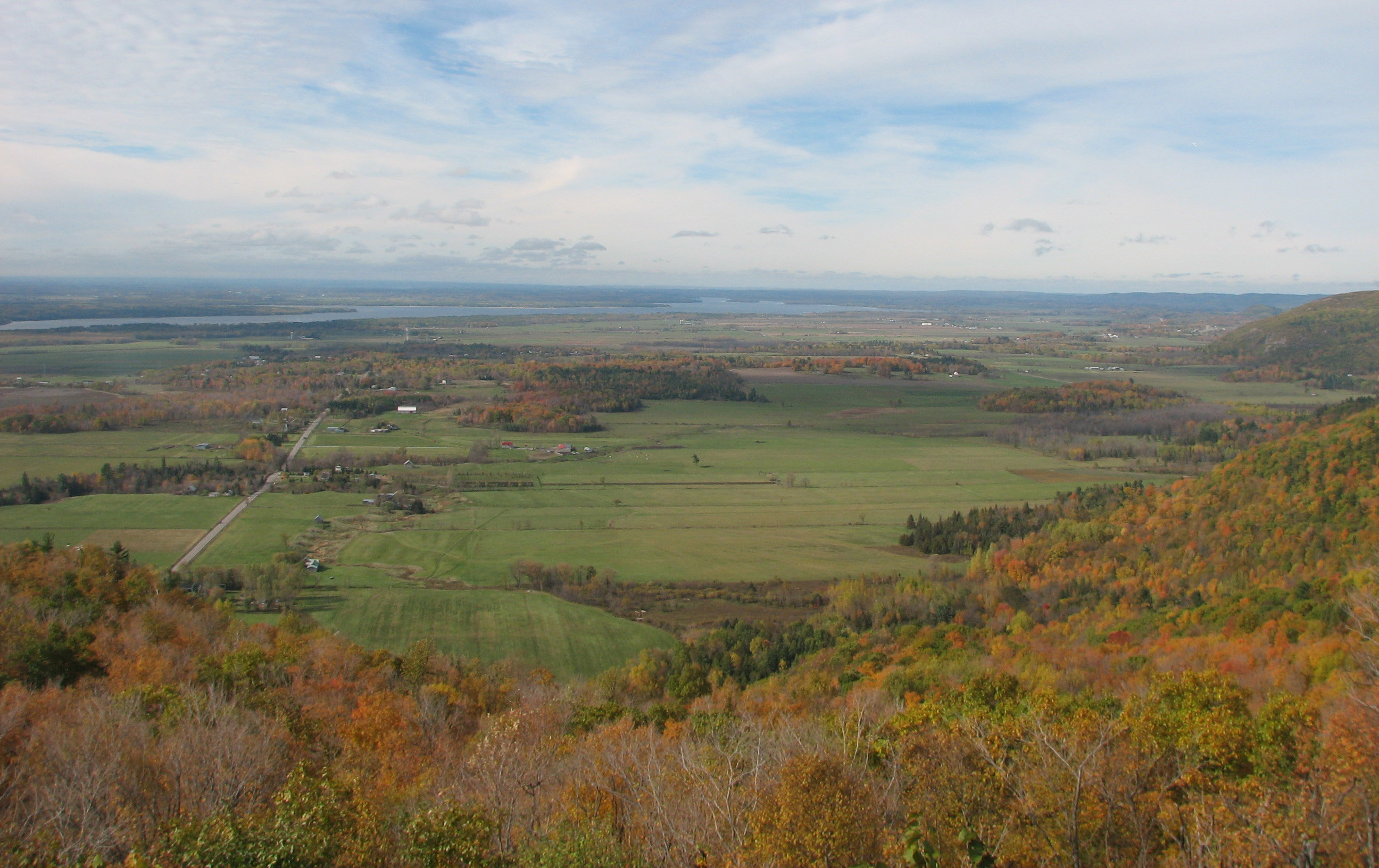 Ottawa Valley